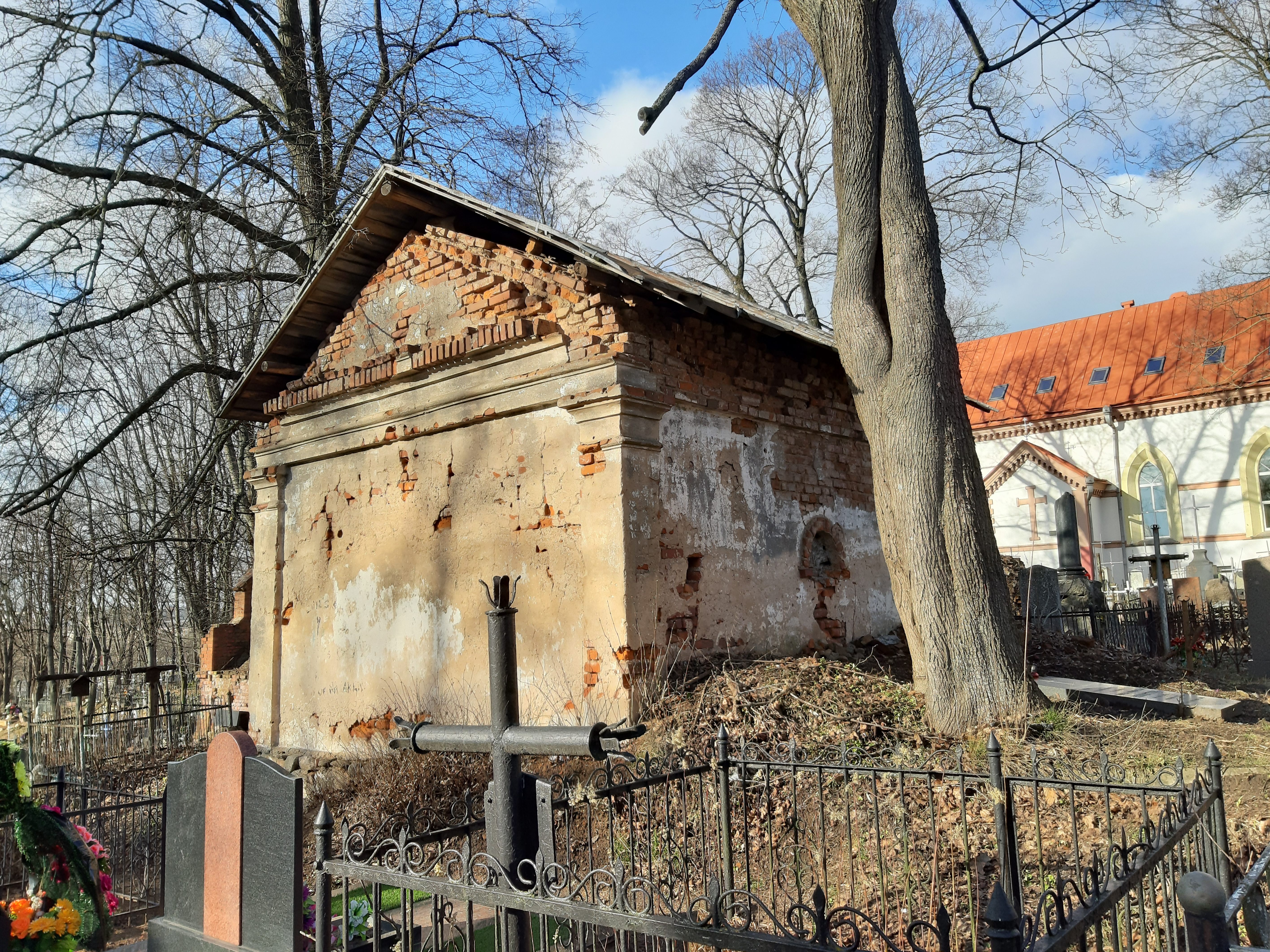 Мінск. Кальварыйскія могілкі. 2020